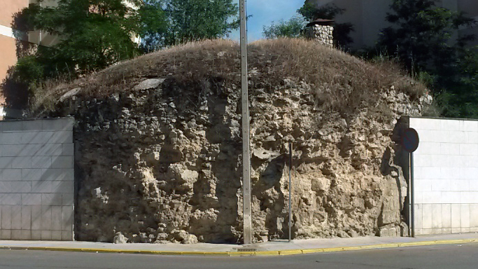 Resto de uno de los cubos del Palacio de los Condes de Benavente en la Avenida de Valladolid